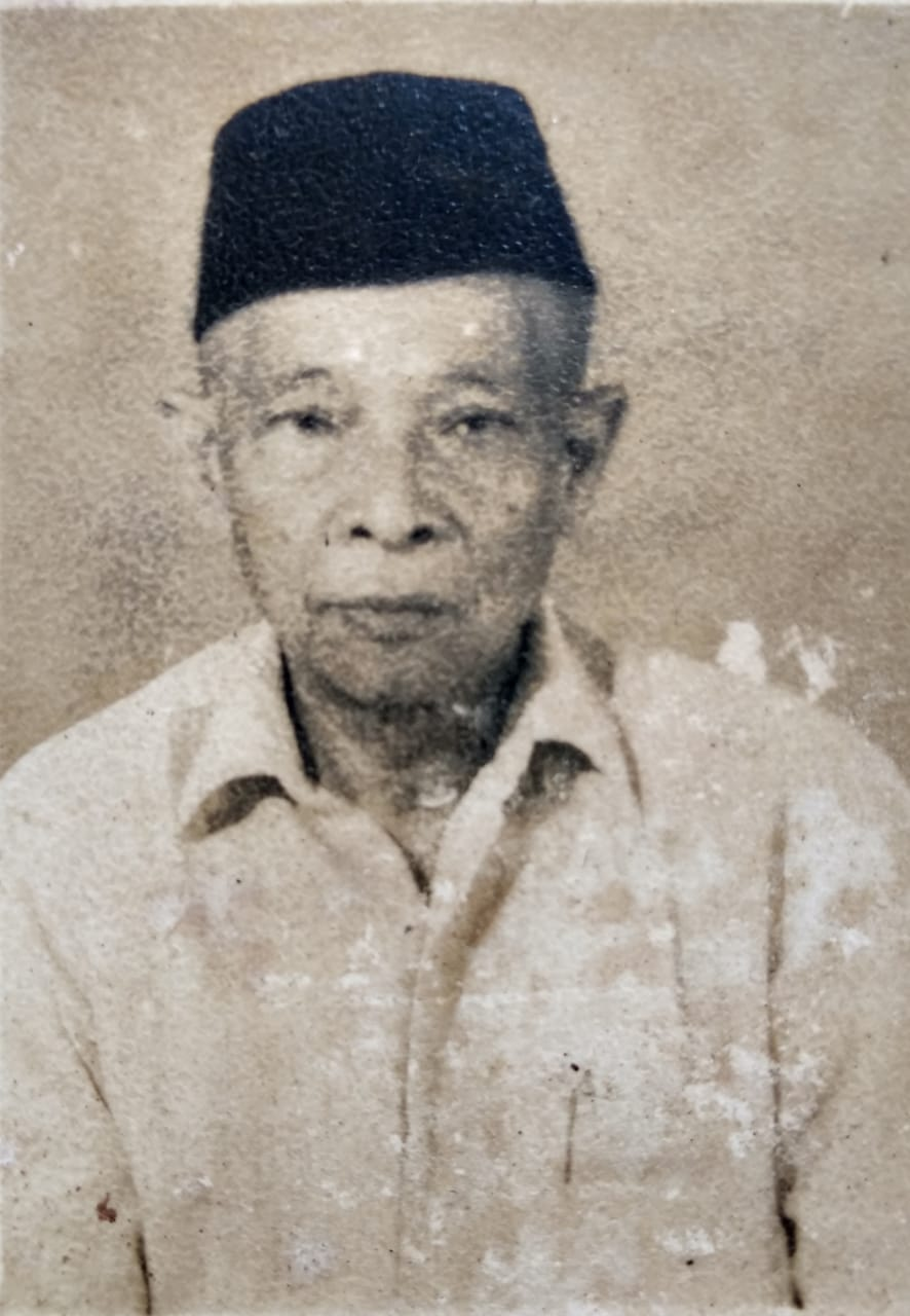 Tubagus Alipan 1902-1977